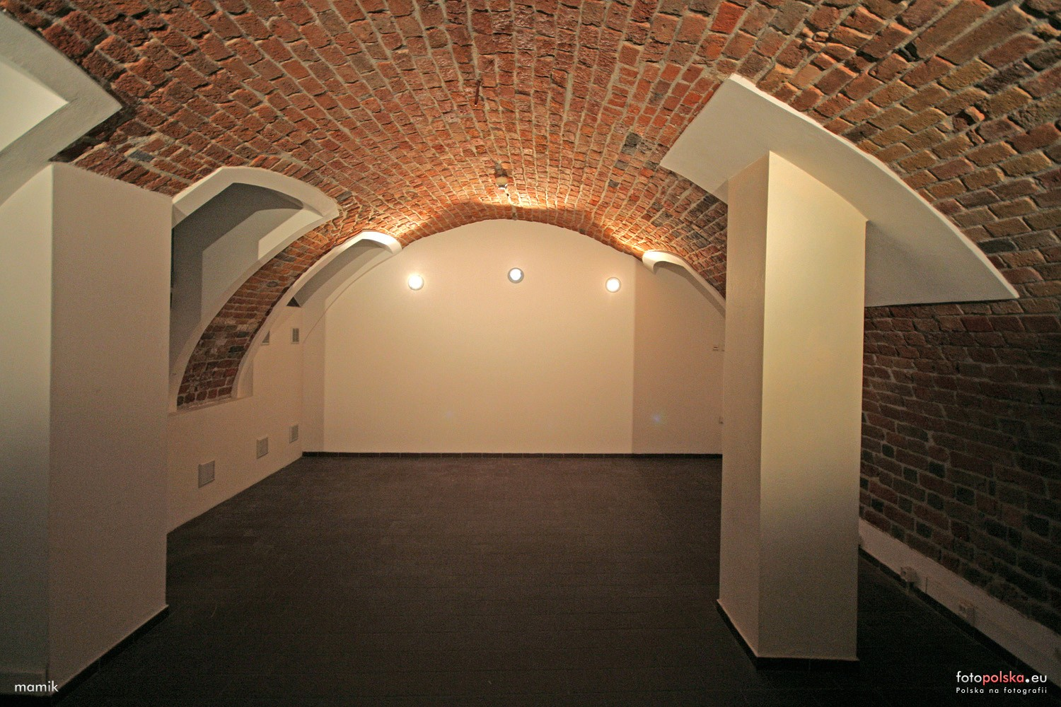 Apteka „Pod Murzynem” - piwnice